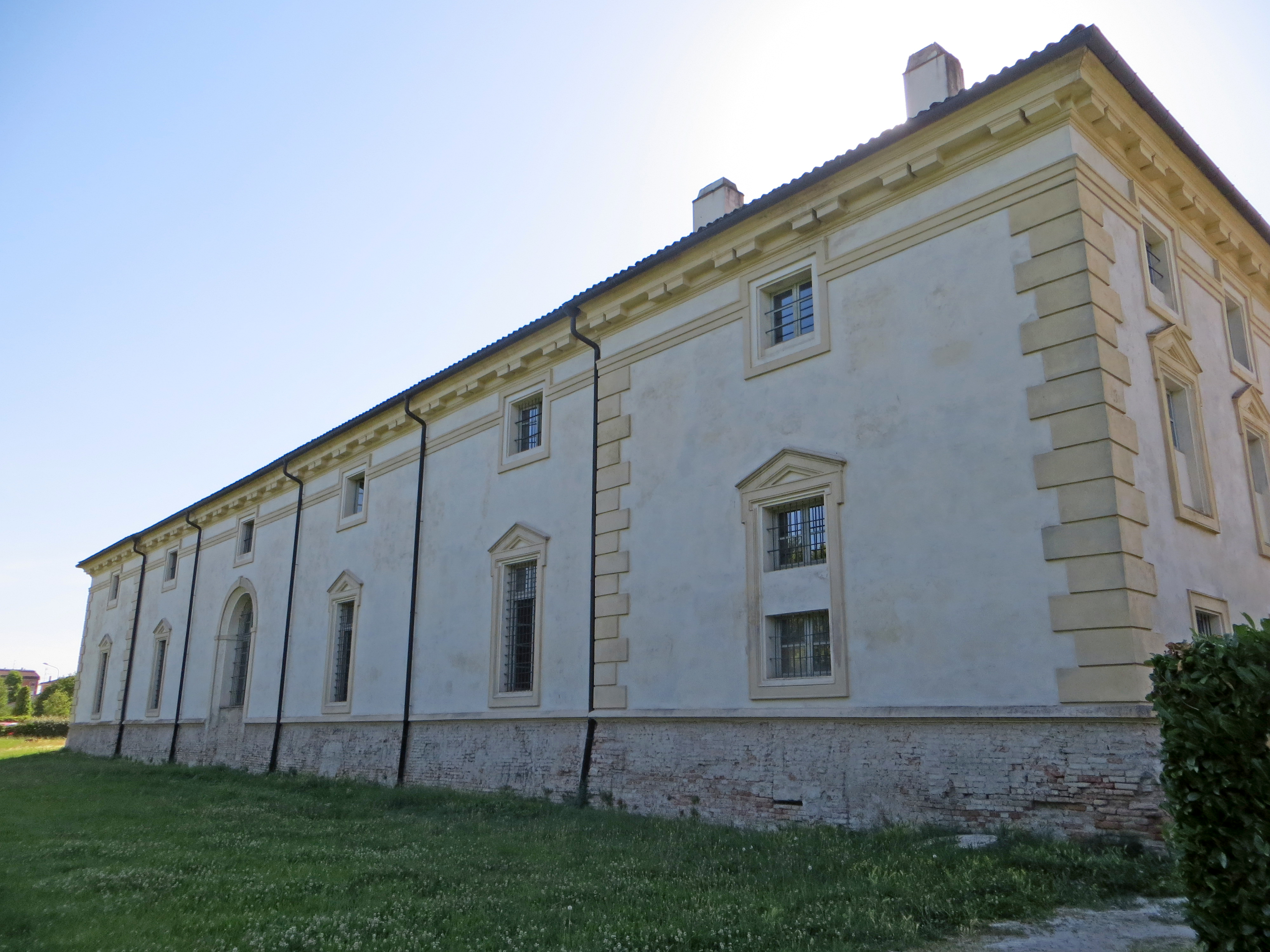 Aranciaia (Colorno) - lato est